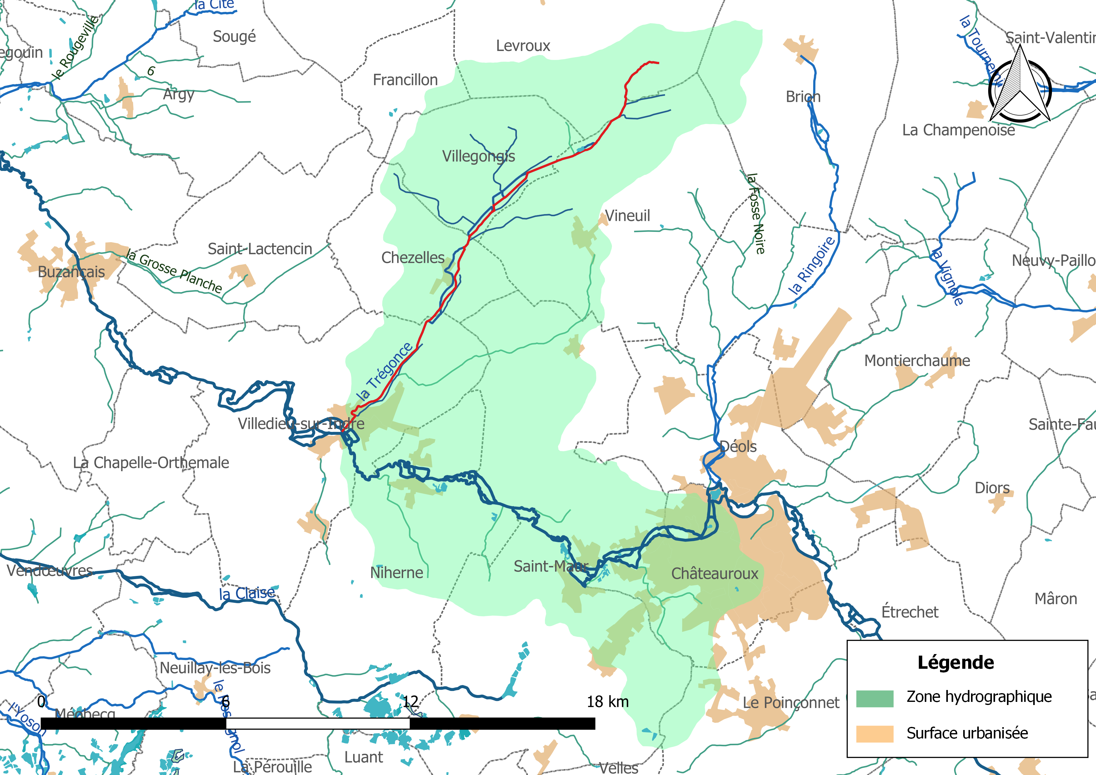 Carte du cours d'eau « la Trégonce » (France) et de la zone hydrographique dans laquelle il s'insère.